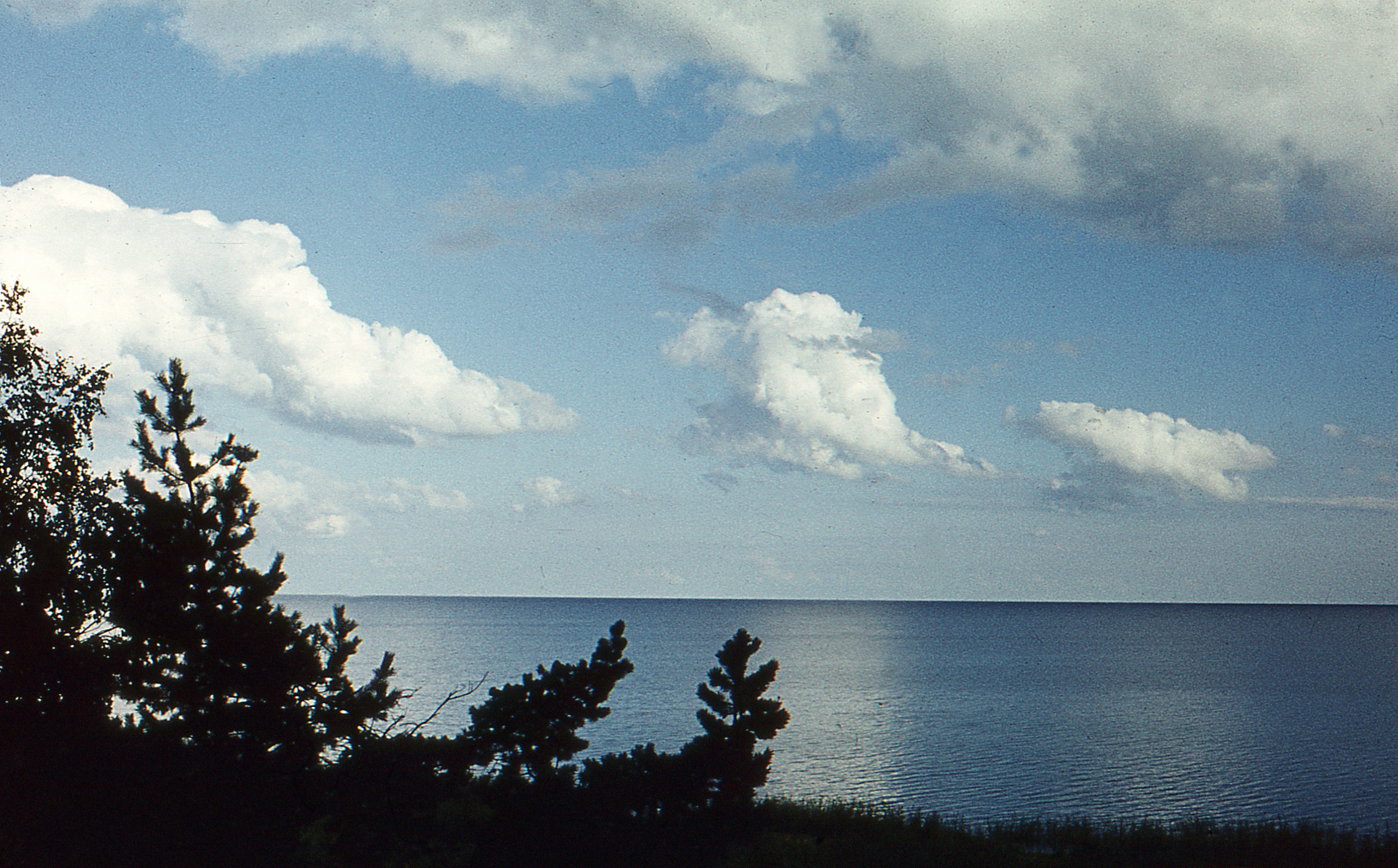 Чудское озеро.Вид с дюн при Каукси.